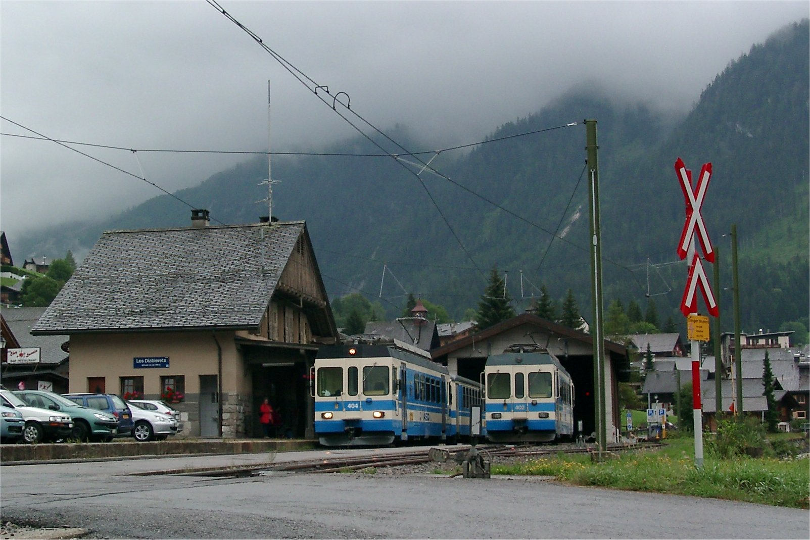 Der Bahnhof von Les Diablerets